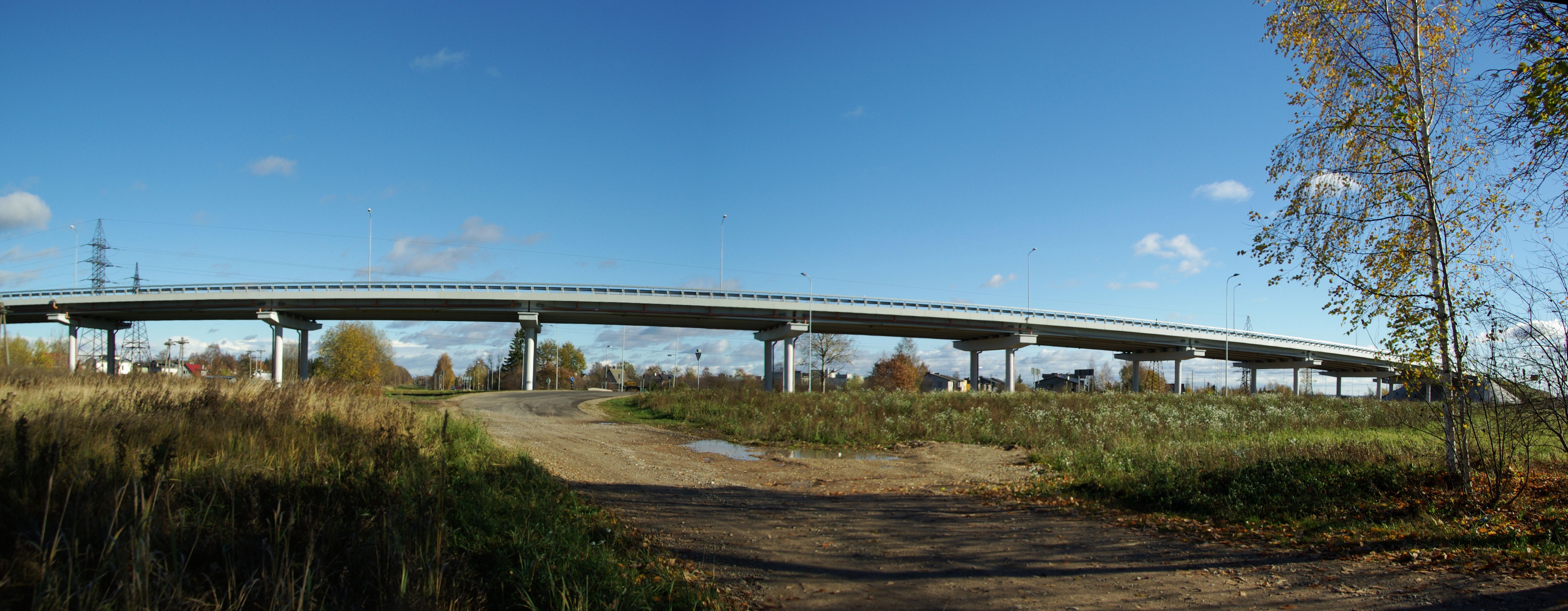 viadukt on Tartus Variku linnaosas